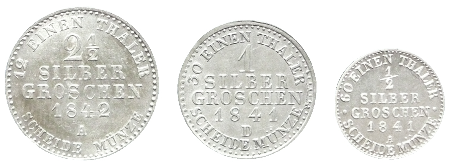 Silbergroschen Königreich Preußen 1842 Revers